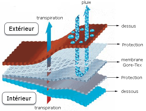 Traduction d'un schéma danois en GFDL par Wart Dark